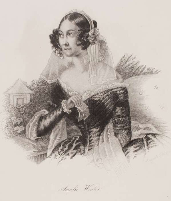 Bildnis Amalie Freifrau von Groß, geb. von Seebach (Ps. Amalie Winter) (1802-1879), Stahlstich angefertigt von Auguste Hüssener